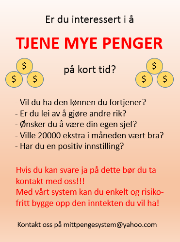 Typisk reklame for pyramidespill